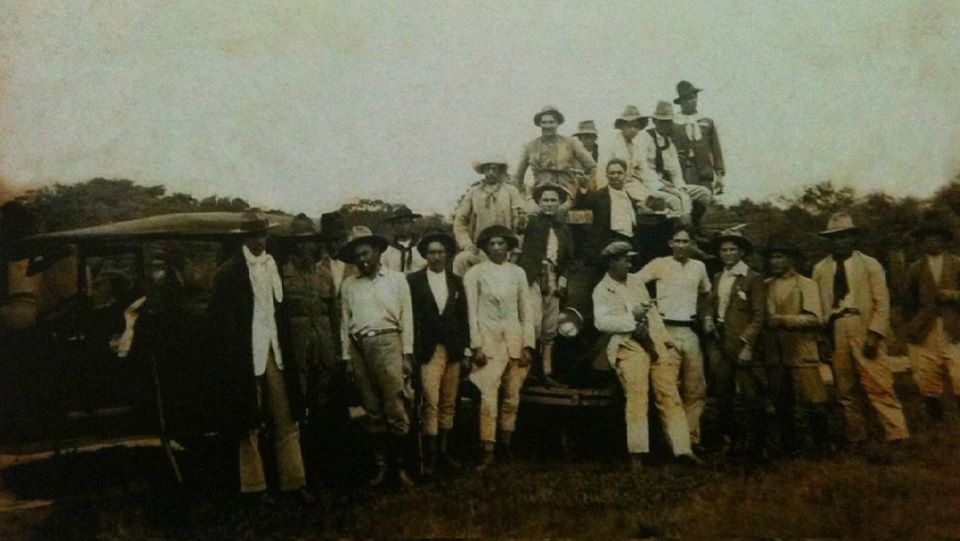 Combatentes maracajuenses (sul-mato-grossenses), da região de Ponta Porã/MS, durante a Revolução Constitucionalista de 1932, sob o comando de Aral Moreira, que foi um dos principais revolucionários e defensores da emancipação da região que contempla o atual Estado do Mato Grosso do Sul. A imagem está disponível no livro "Um Homem de Seu Tempo" (2011) de Luiz Alfredo Marques Magalhães.